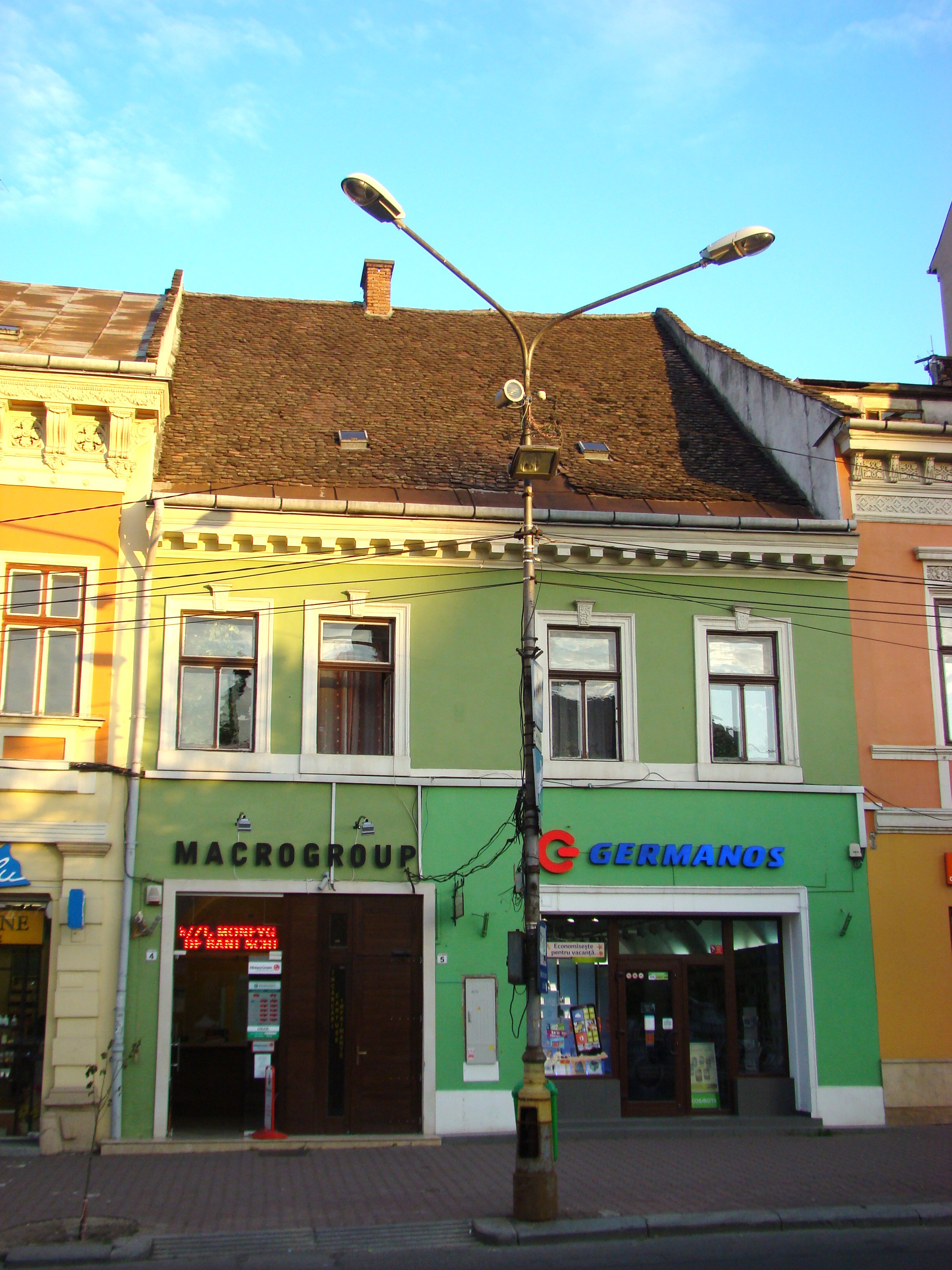 Clădire monument istoric, Piața Unirii Nr.5